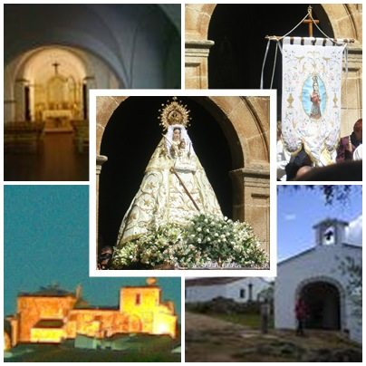 virgen del campo de aliseda(caceres)